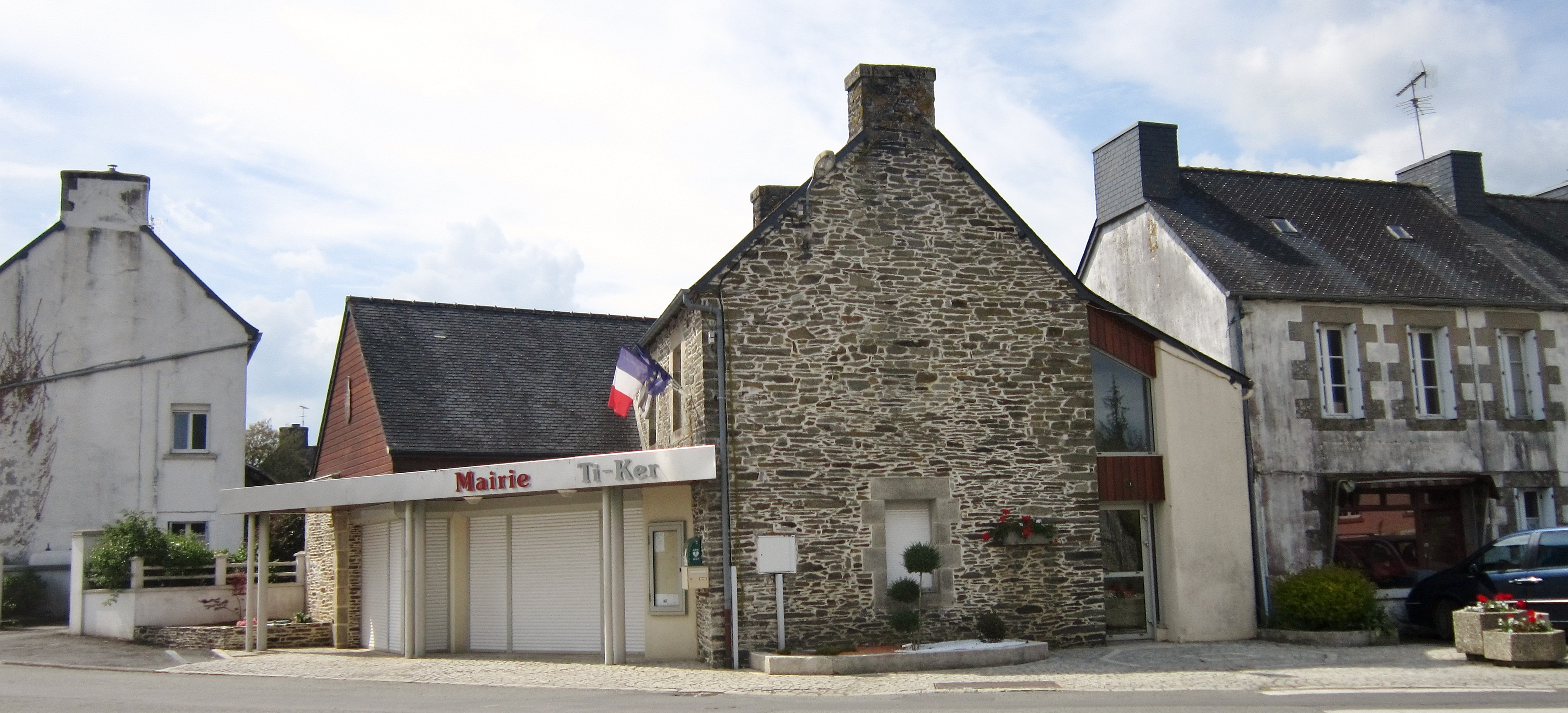 Paule (Côtes-d'Armor) : la mairie.